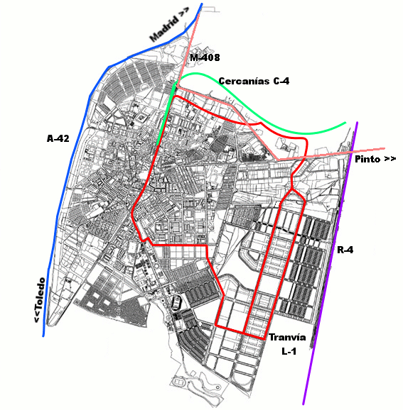 Mapa resumen con las comunicaciones existentes en Parla.